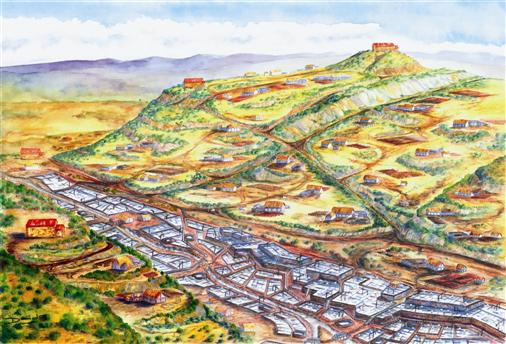 Valle Salado de Añana en la Alta Edad Media. Ca. siglo IX